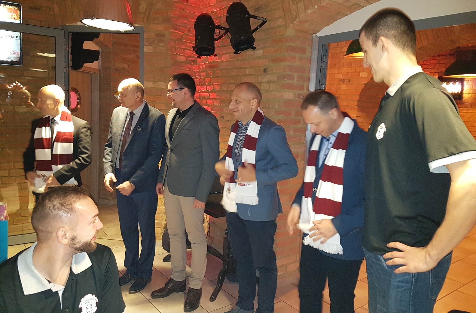 Stargard, wigilia w Spójni (20.12.2018)